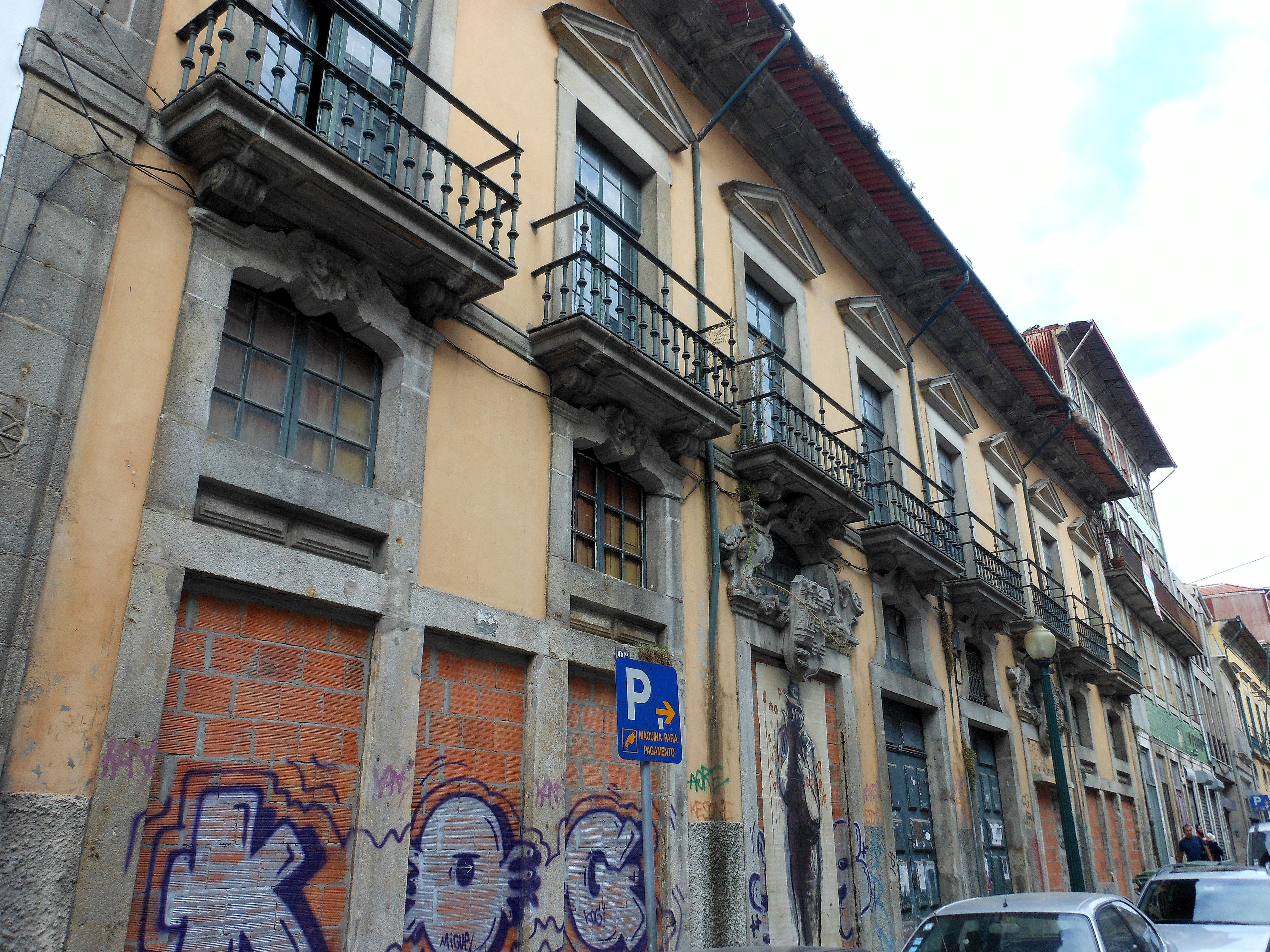 Casa dos Ferrazes Bravos ou Casa dos Maias, Porto, Portugal. This file was uploaded for Wiki Loves Monuments in Portugal with the unique identifier 74300.